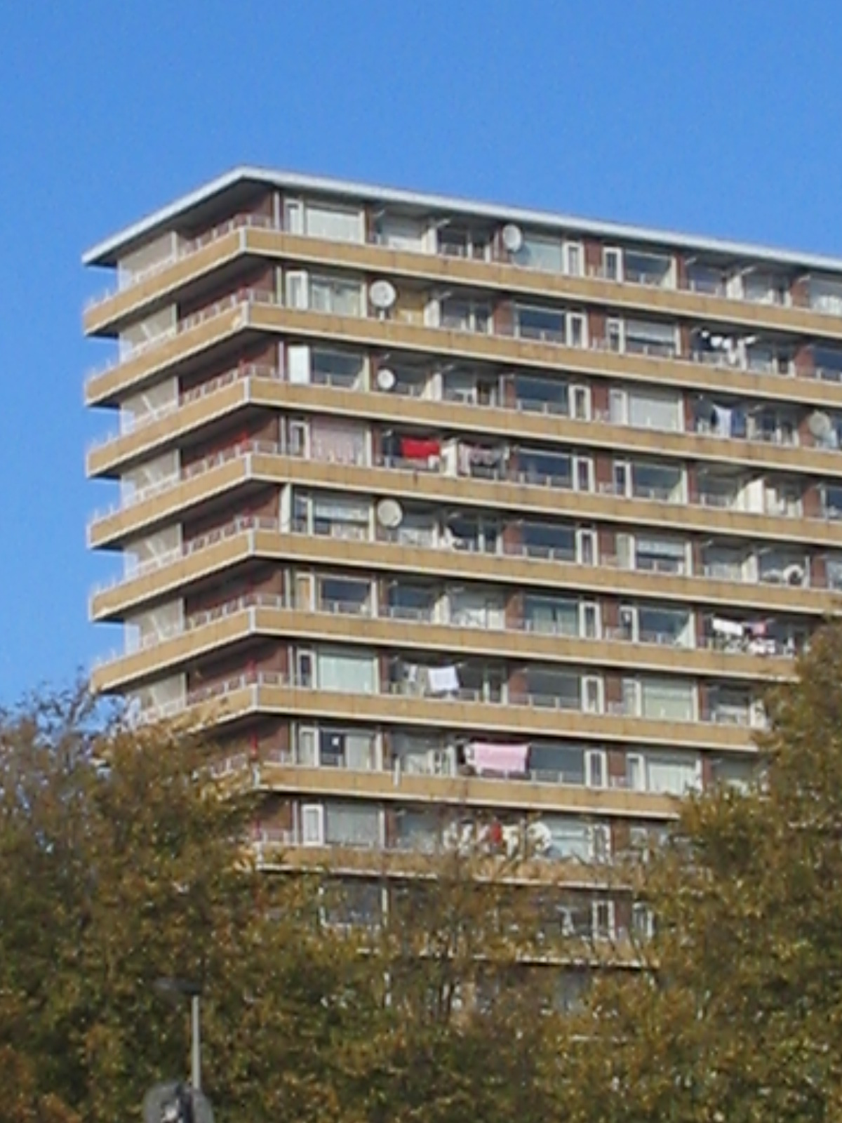 flat in Delft